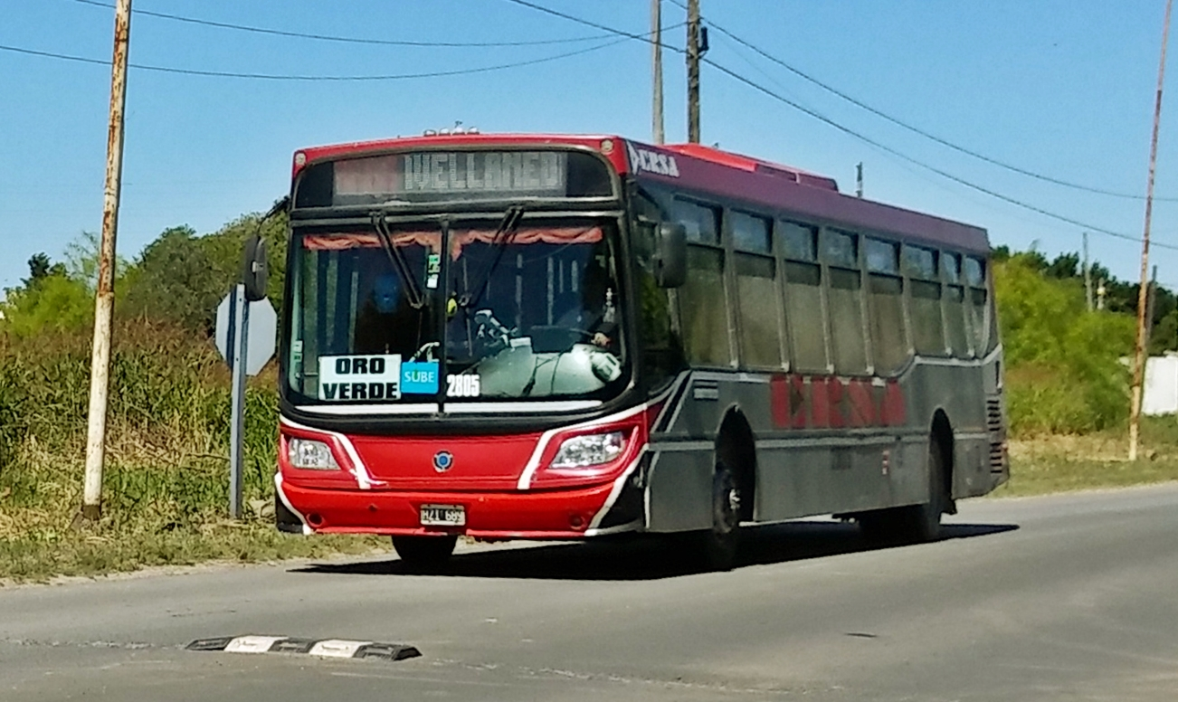 ERSA Urbano Paraná Línea AM (Área Metropolitana) - Interno 2805 Italbus Tropea Mercedes-Benz O500U (Caja Automatica ZF Ecomat) Captado en Av. Jorge Newbery a metros de la intersección con Ruta Nacional 12.